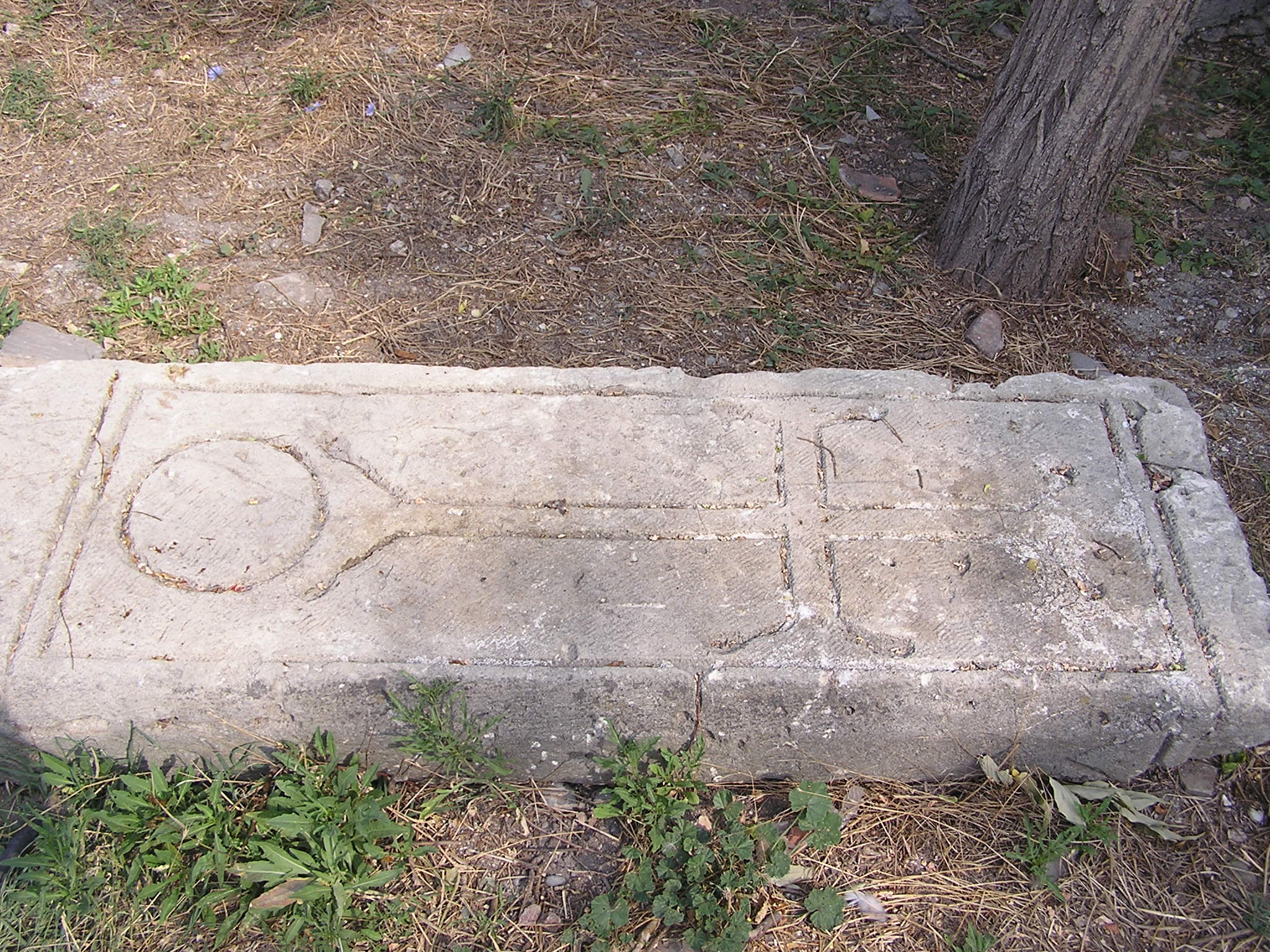 Херсонес. Плита в Херсонесе